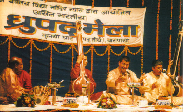 Musiciens